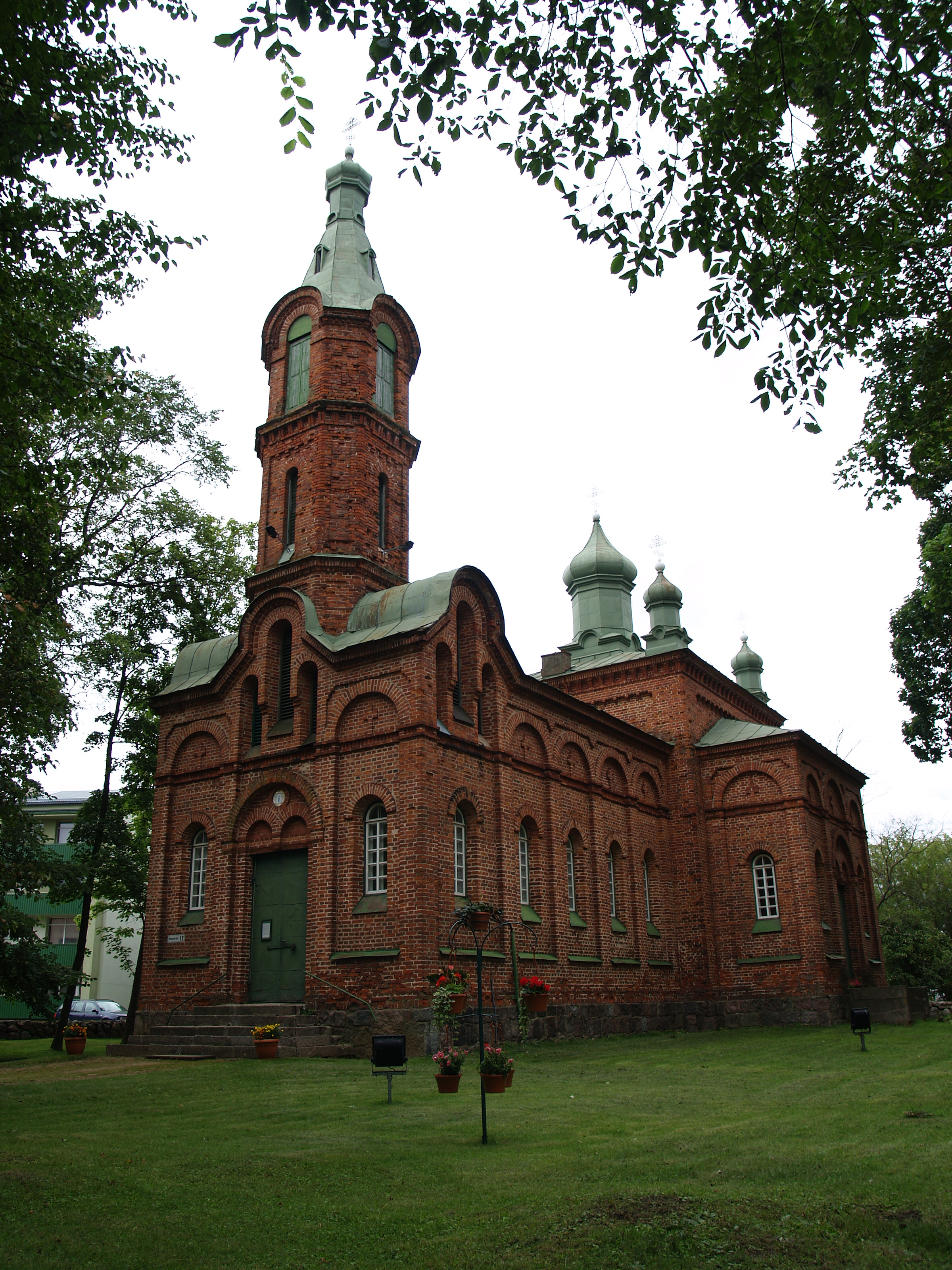 Salatsi õigeusu kirik